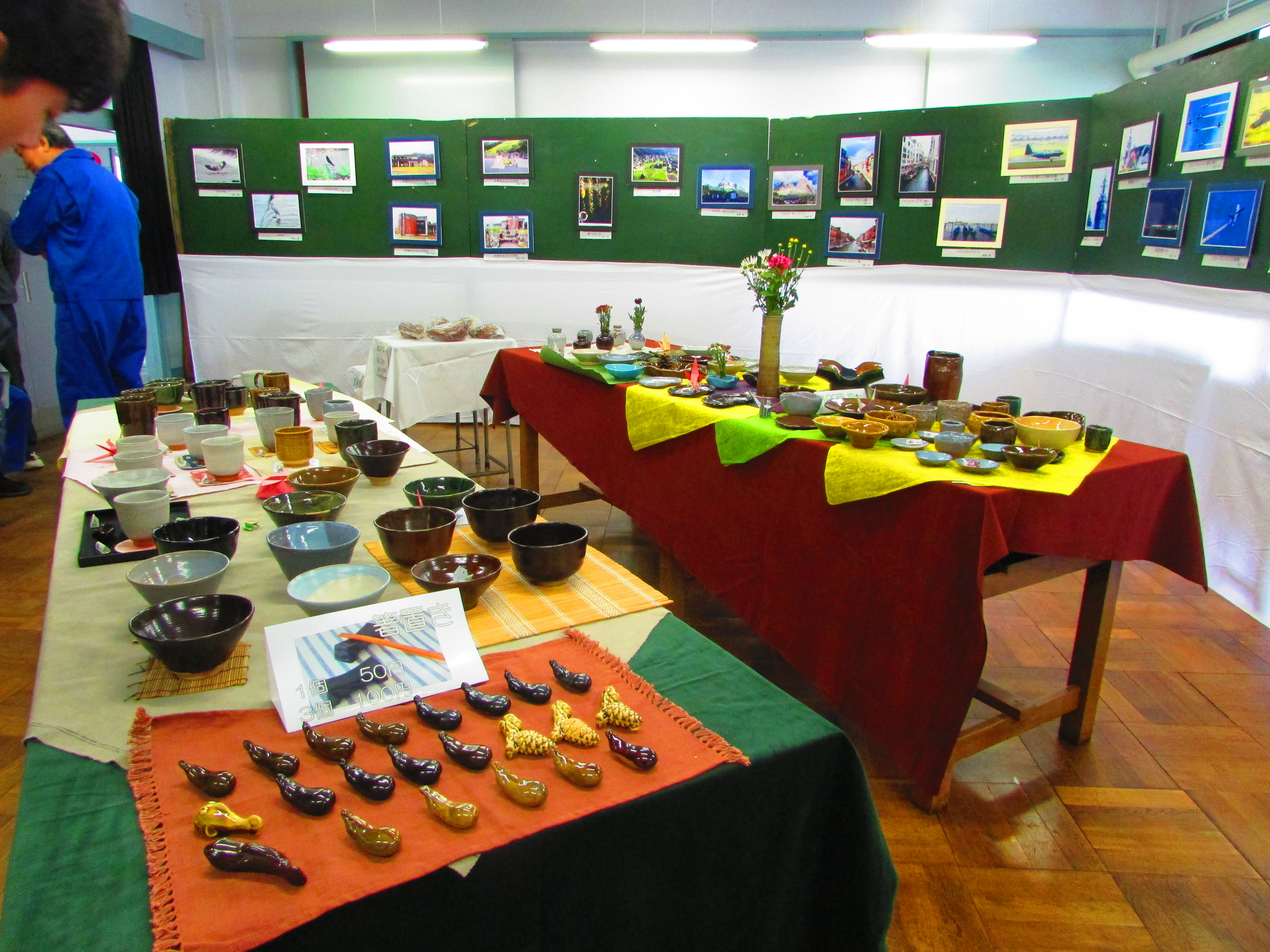 毎年定時制陶芸部は作品を出品販売している